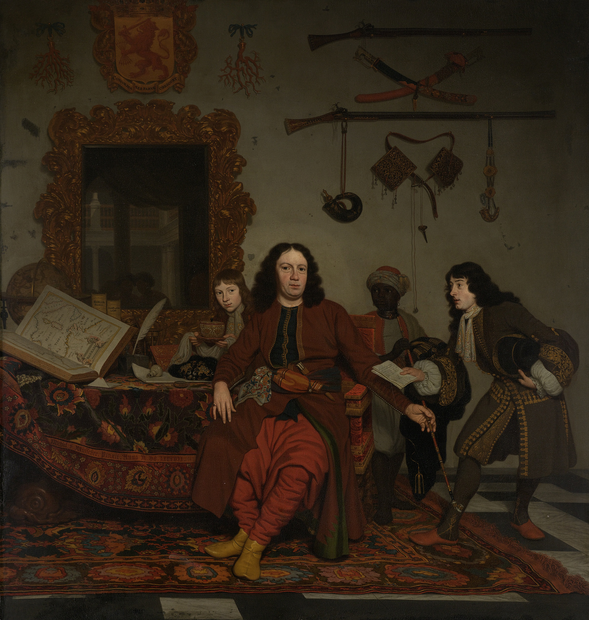 Portretten van Thomas Hees, resident en commissaris der Staten Generaal bij de regeringen te Algiers, Tunis en Tripolis, bemiddelaar inzake de vrijkoop van slaven te Algiers in 1683 met zijn neven Jan en Andries Hees, en Thomas de zwarte bediende. Ten voeten uit zittend aan een tafel, een pijp in de linkerhand. Op tafel liggen een opengeslagen atlas, boeken, inktstel en een globe. Aan de achterwand hangen enkele geweren, zwaarden, jachthoorns, takken koraal en een wapen met de Hollandse Leeuw.; Michiel van Musscher (1645–1705), olieverf op doek, 1687